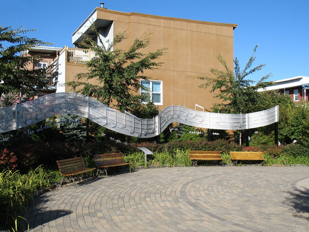 Hommage à Sylvain Lelièvre – Portée musicale et/ou La portée des mots. Œuvre de Florent Cousineau inaugurée en 2004 et localisée au Parc Sylvain-Lelièvre à Limoilou, Québec.